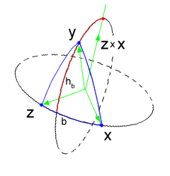 ilustracja do dowodu tw. sinusów